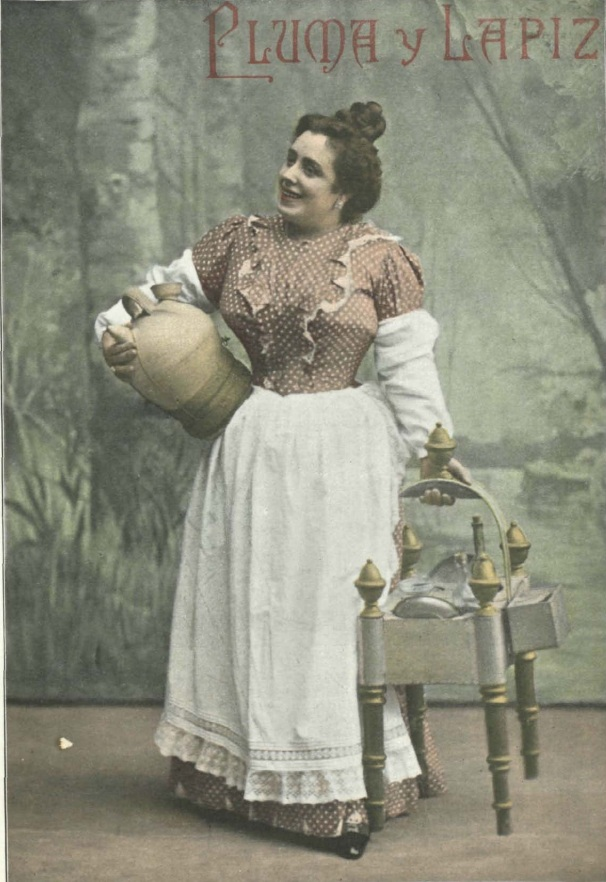 Luisa Campos, en la zarzuela Agua, azucarillos y aguardiente; fotografía de Pablo Audouard.